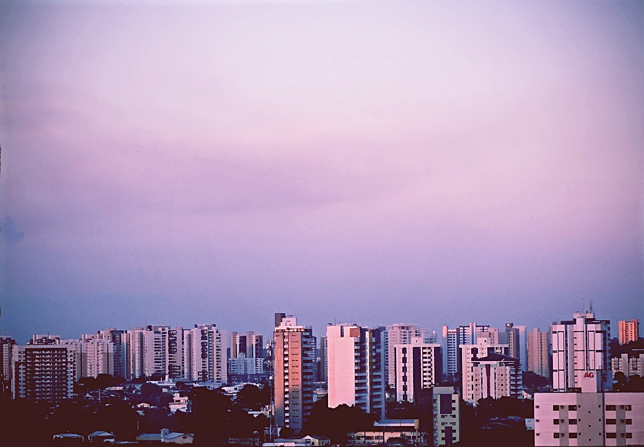 Vista parcial de Manaus, Amazonas, Brasil.